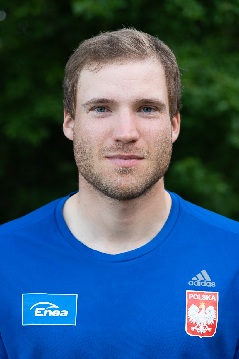 Polski wioślarz Szymon Pośnik 2019